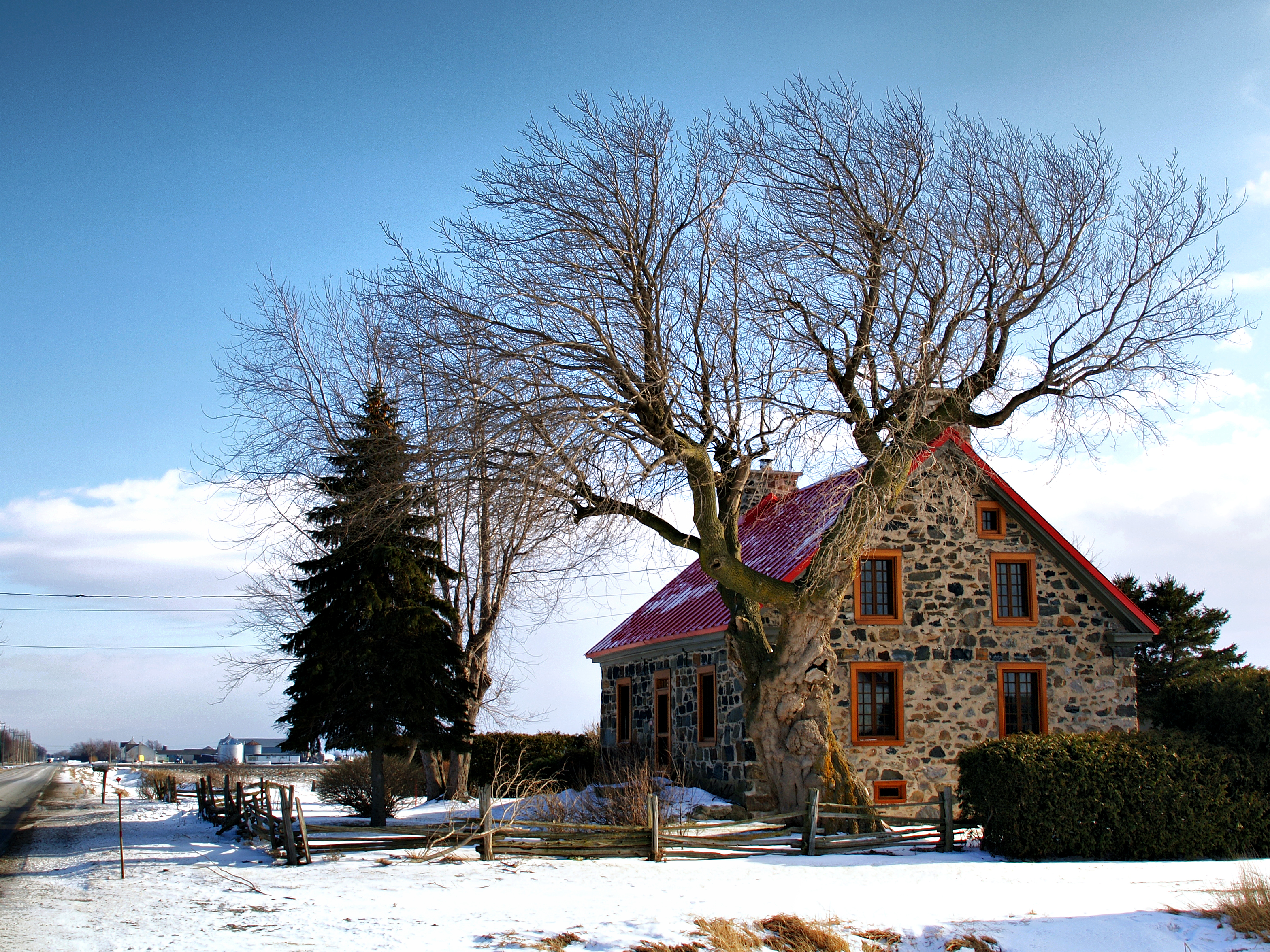 Saint-Damase, Montérégie (Québec) - Maison